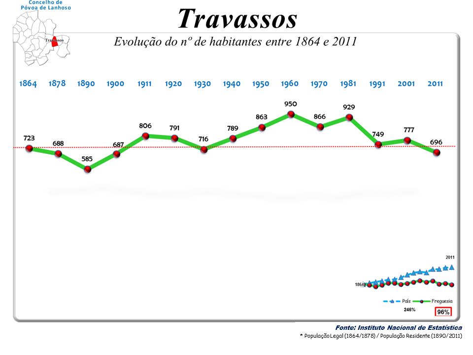 Censos 1864/2011